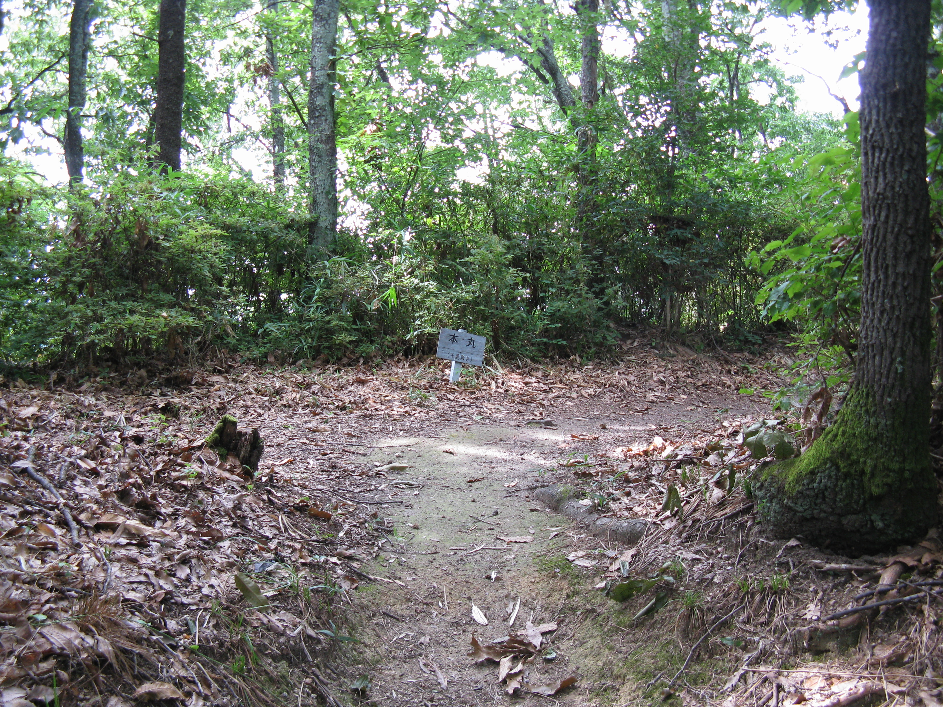 上赤坂城址 本丸